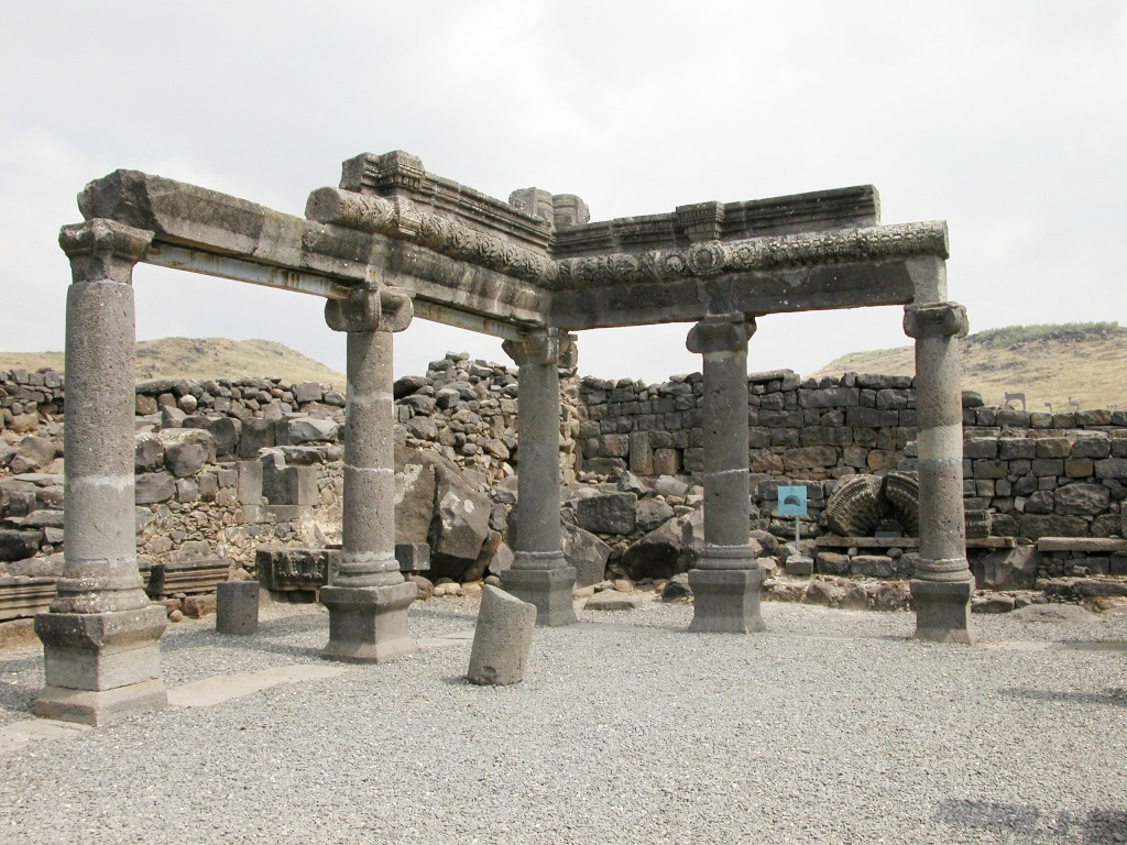 Old Synagogue in Korazim Israel.